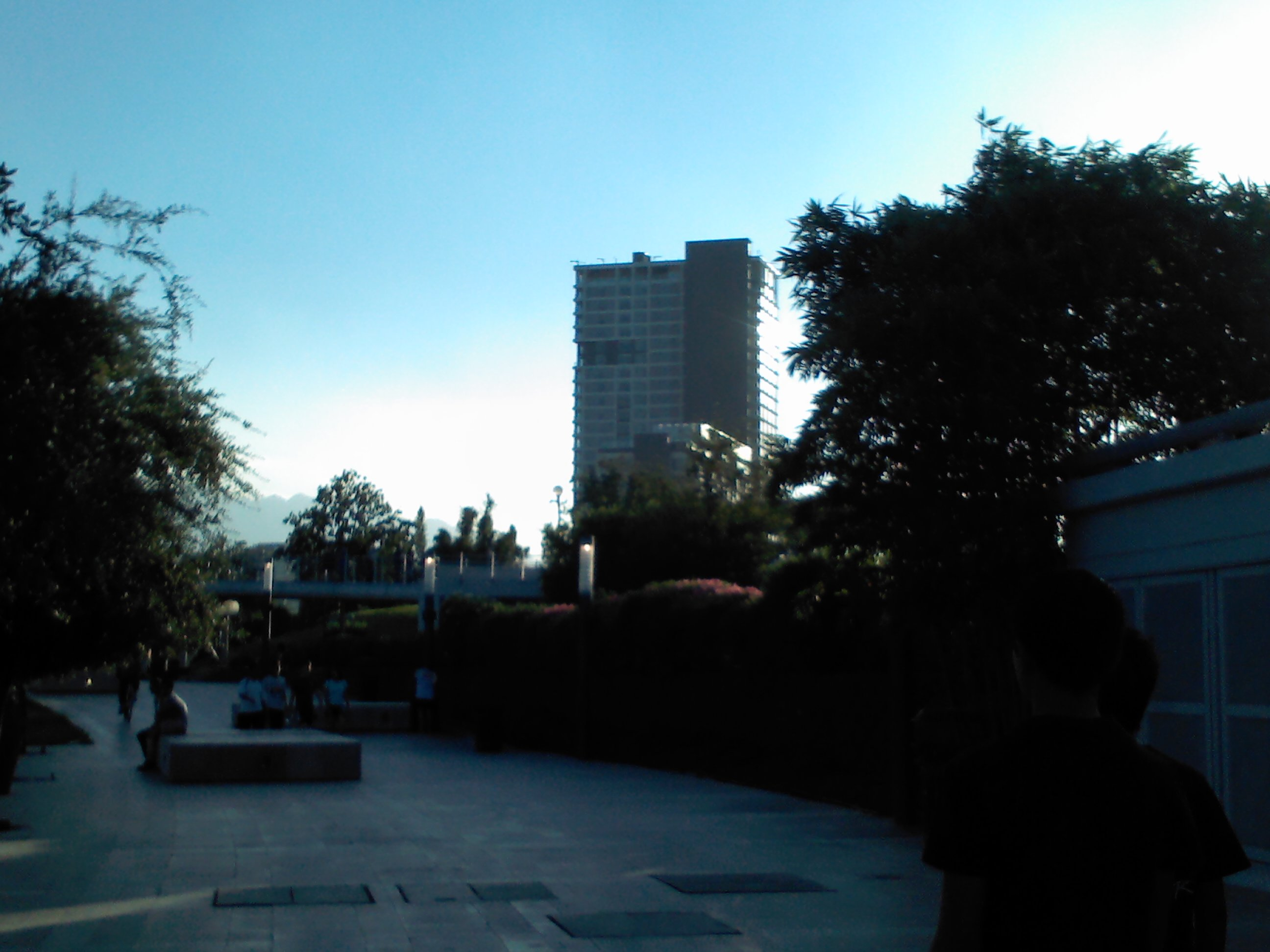 Vista del edificio desde Santa Lucia.